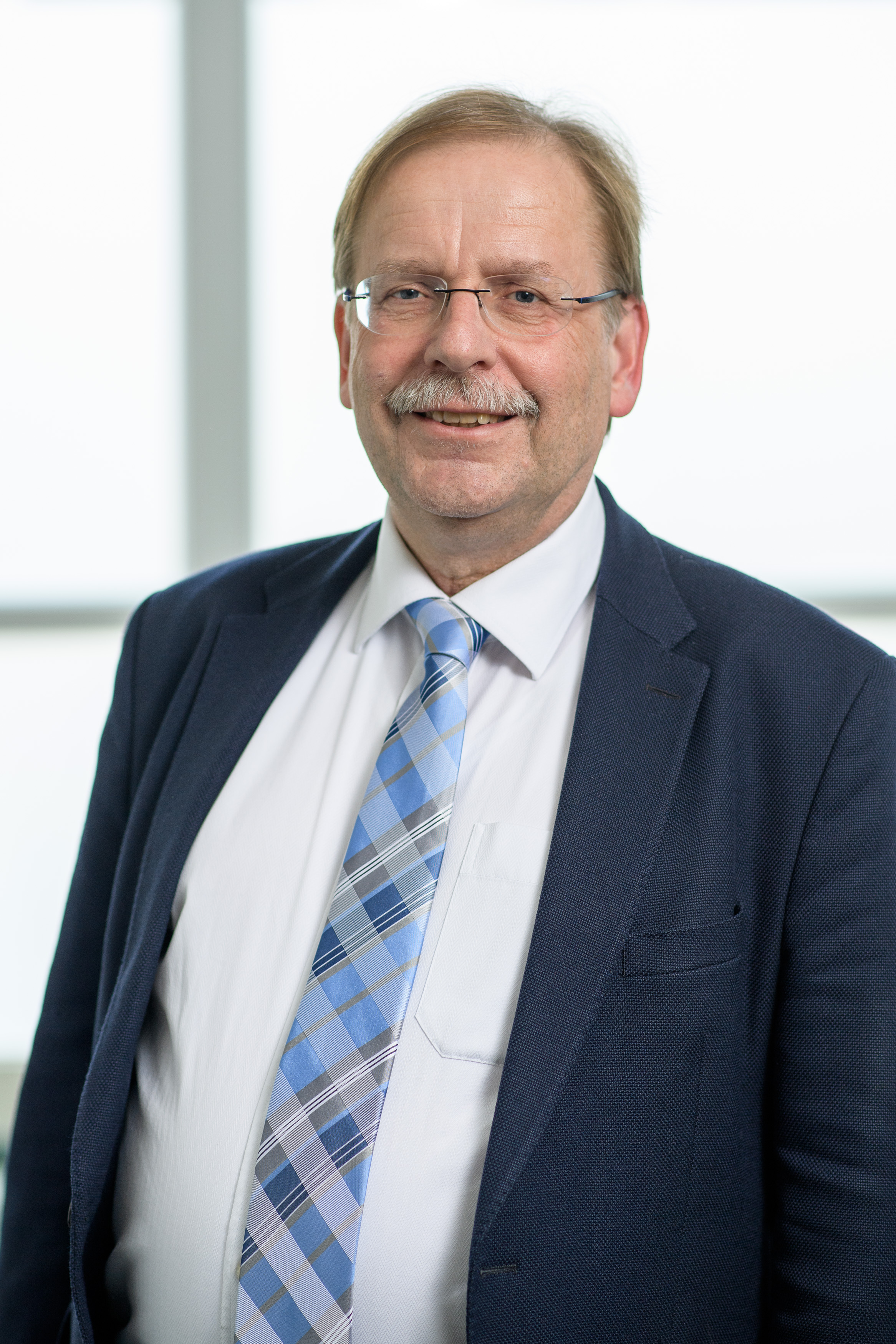 Porträtfoto Dr. Rainer Koch aus dem Jahr 2018